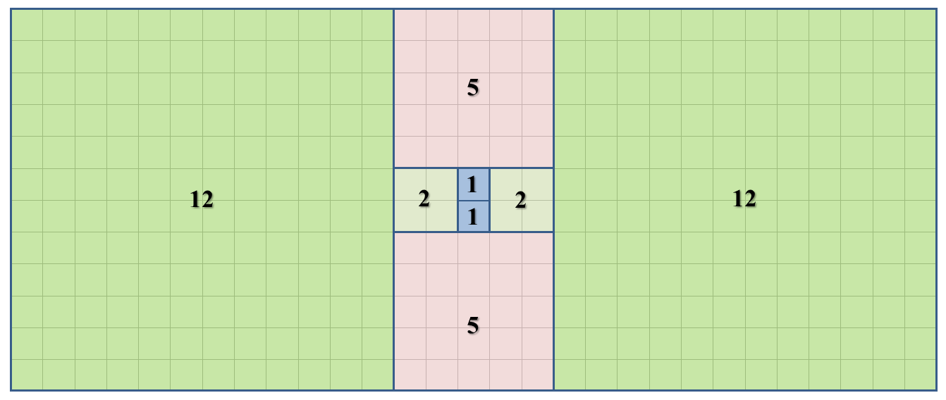 Construcción gráfica de la serie de números de Pell